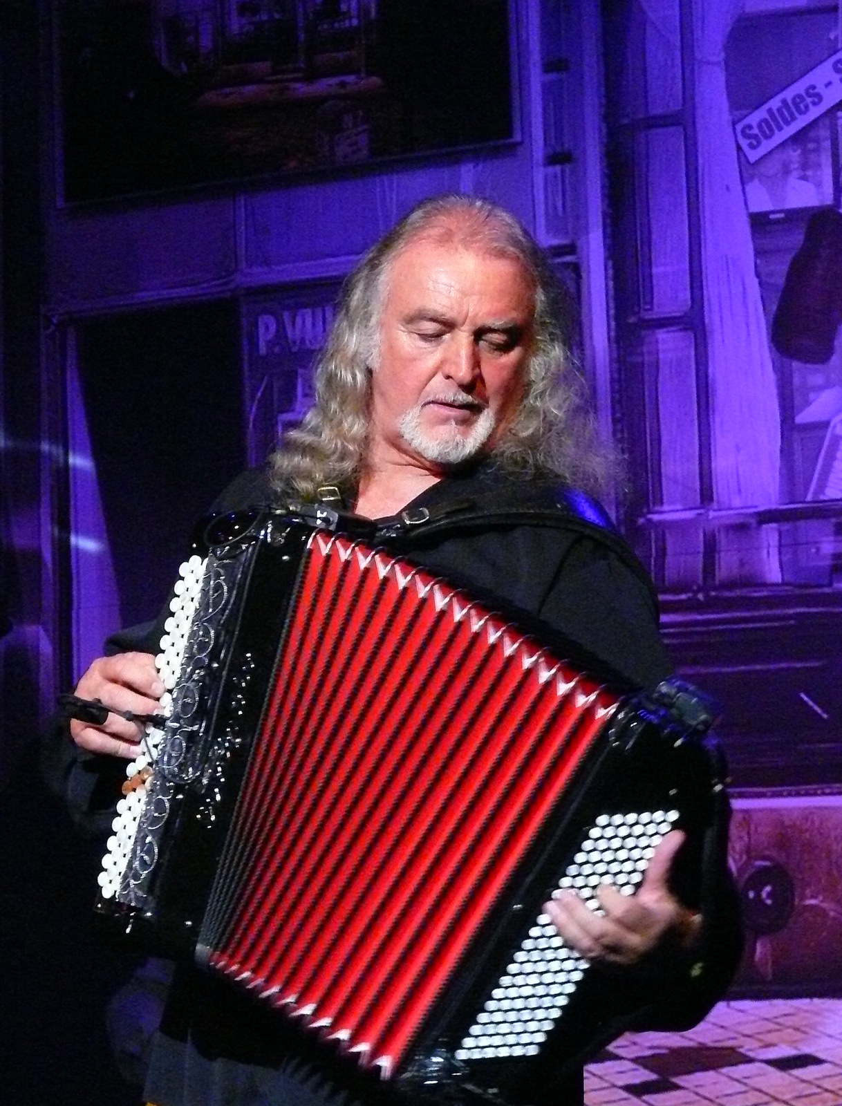 Spectacle Rue de la Belle Ecume